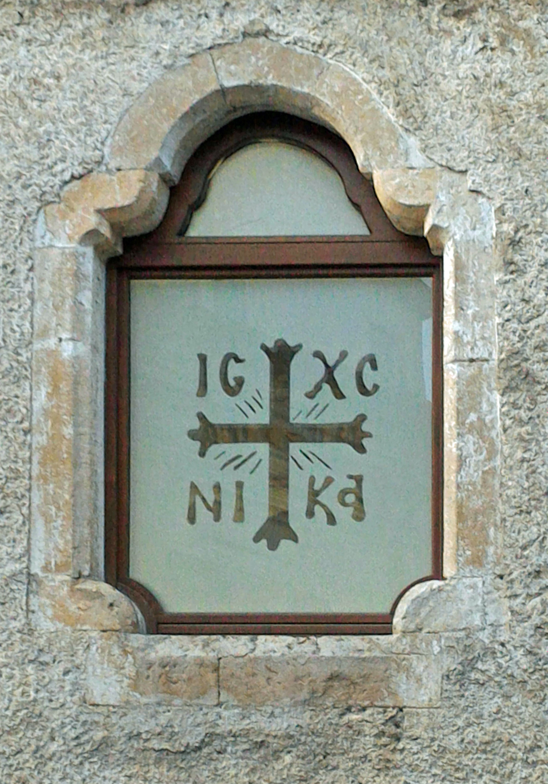 La Chiesa di San Salvatore a Cosenza è di rito greco ortodosso. Nel simbolo di antichissima tradizione bizantina, oltre alla croce greca compare il cristogramma "IC XC" e la parola NIKA. L'scrizione significa "Gesù Cristo vince".